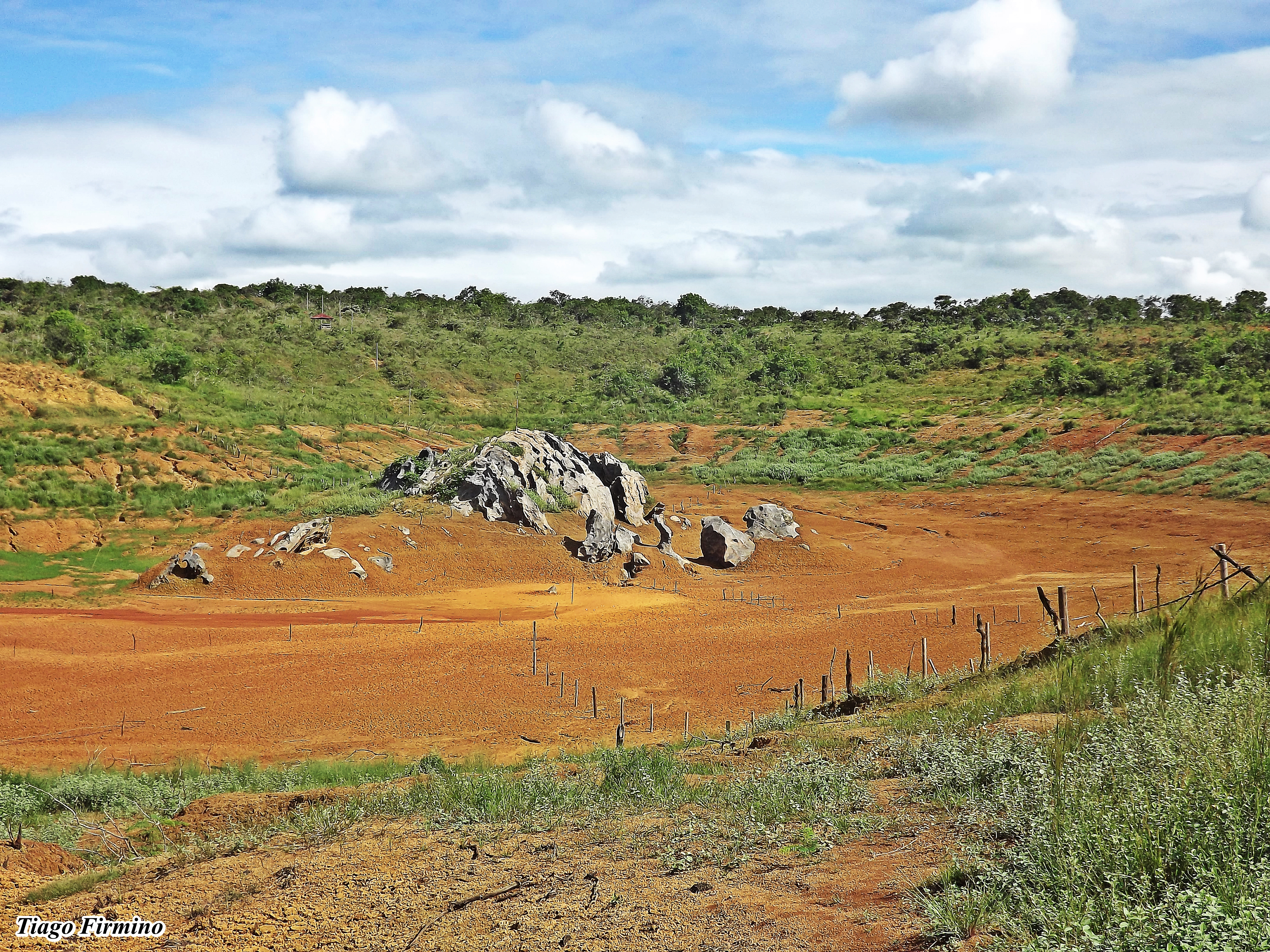 Lagoa da Pedra em Bambuí MG. Completamente seca em 17/01/2016.